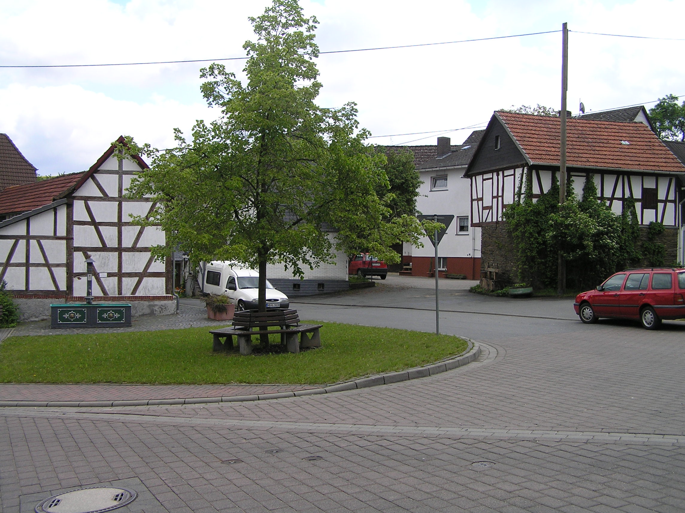 Naunstadt, Grävenwiesbach, Blick vom DGH auf den Platz und den Brunnen